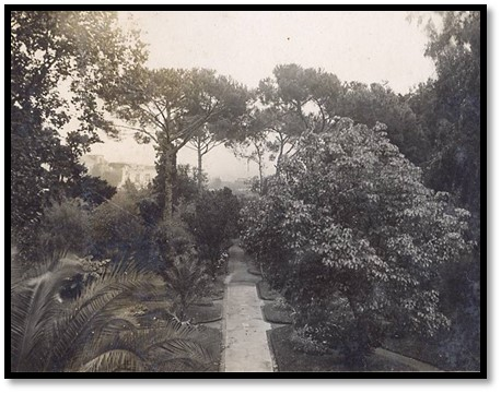 il gioradino all'Italiana di Villa Amirante